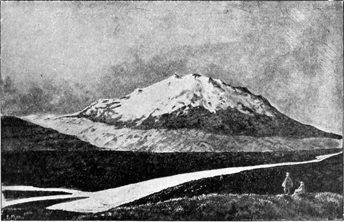 Hekla circa 1904. Greyscale. Levels adjusted. Identifier: islandambeginnde00guth Title: Island am Beginn des 20 Jahrhunderts; Year: 1904 (1900s) Authors: Guthmundsson, Valtýr Subjects: Publisher: Kattowitz in Schl., Böhm View Book Page: Book Viewer About This Book: Catalog Entry View All Images: All Images From Book Click here to view book online to see this illustration in context in a browseable online version of this book. Text Appearing Before Image: n Kratern. gespalten; hierdurch hat sich eine unzählige Menge von kleinen Höhen,Rücken, Dämmen und kesseiförmigen Vertiefungen gebildet. Es ist,wie wenn das Eis in einer Meeresbucht infolge heftigen Seeganges inStücke geborstenund das Ganzedann plötzlich er-starrt wäre. Indiesen Lavaströ-men befinden sichviele Spalten undHöhlen, indem die flüssige Masse unter der abgekühlten Überfläche weitergeströmt ist.Die berühmteste dieser Höhlen ist Surtshellir (d. h. Höhle des Feuer-riesen Surtr), die etwa 1500 Meter lang ist. Es gibt auf Island drei Formen von Vulkanen: kegelförmige,ziemlich steil ansteigend, die aus aufeinander folgenden Schichtenvon Asche, Schlacke und Lava zusammengesetzt sind; ferner Lava-kuppen, grosse Vulkane mit geringer Steigung, die ganz aus Lava auf-gebaut sind und an der Spitze einen grossen Kraterschlund haben,sowie endlich lange Kraterreihen mit vielen kleinen Kratern, derenLängsrichtung durch Erdspalten bedingt ist. Der bekannteste isländische Text Appearing After Image: 10. Hekla. Nach D. Brnnn. 10 Die Natur.